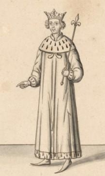 Philippe IV de France